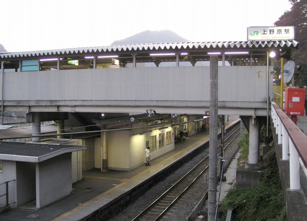 2005年11月23日に投稿者が撮影 上野原駅北口と駅舎